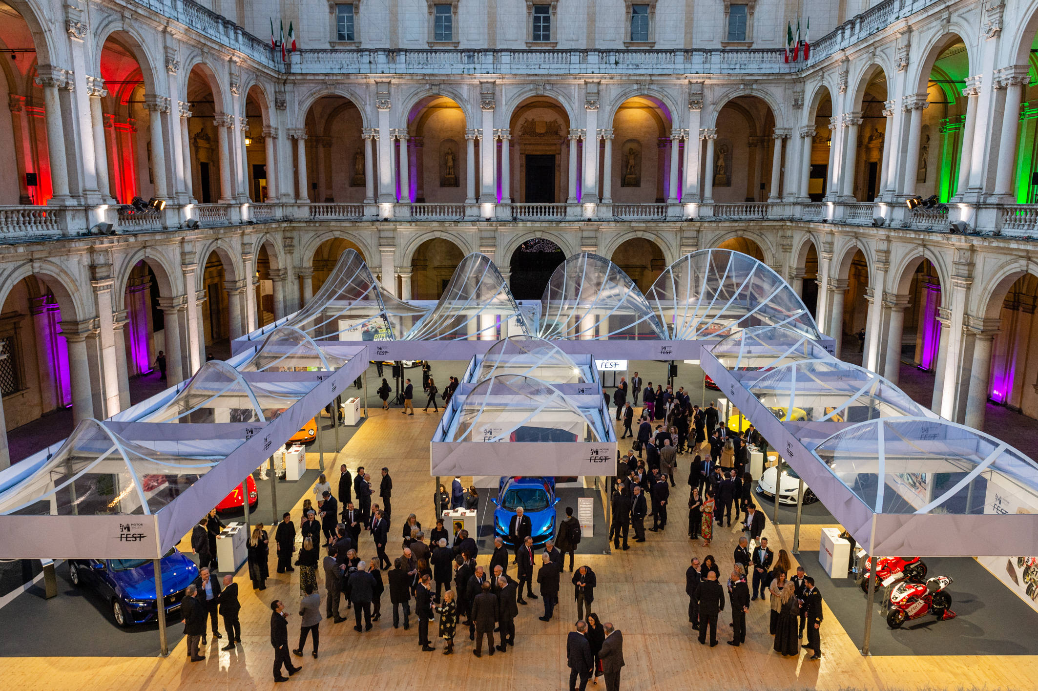 esposizione